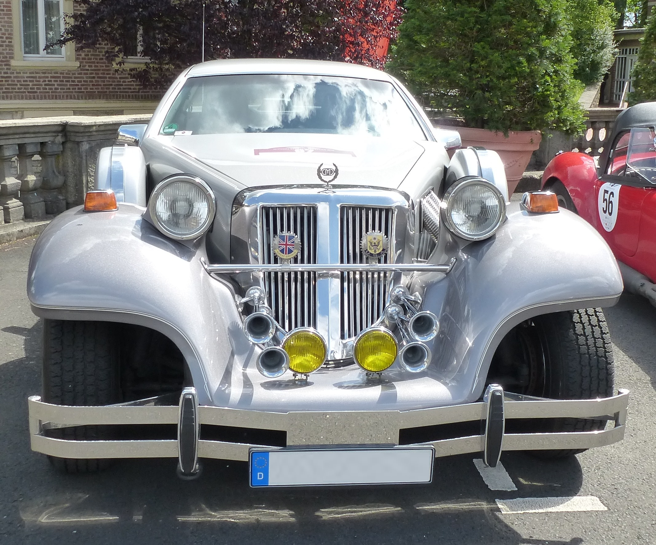 CMC Tiffany 1986